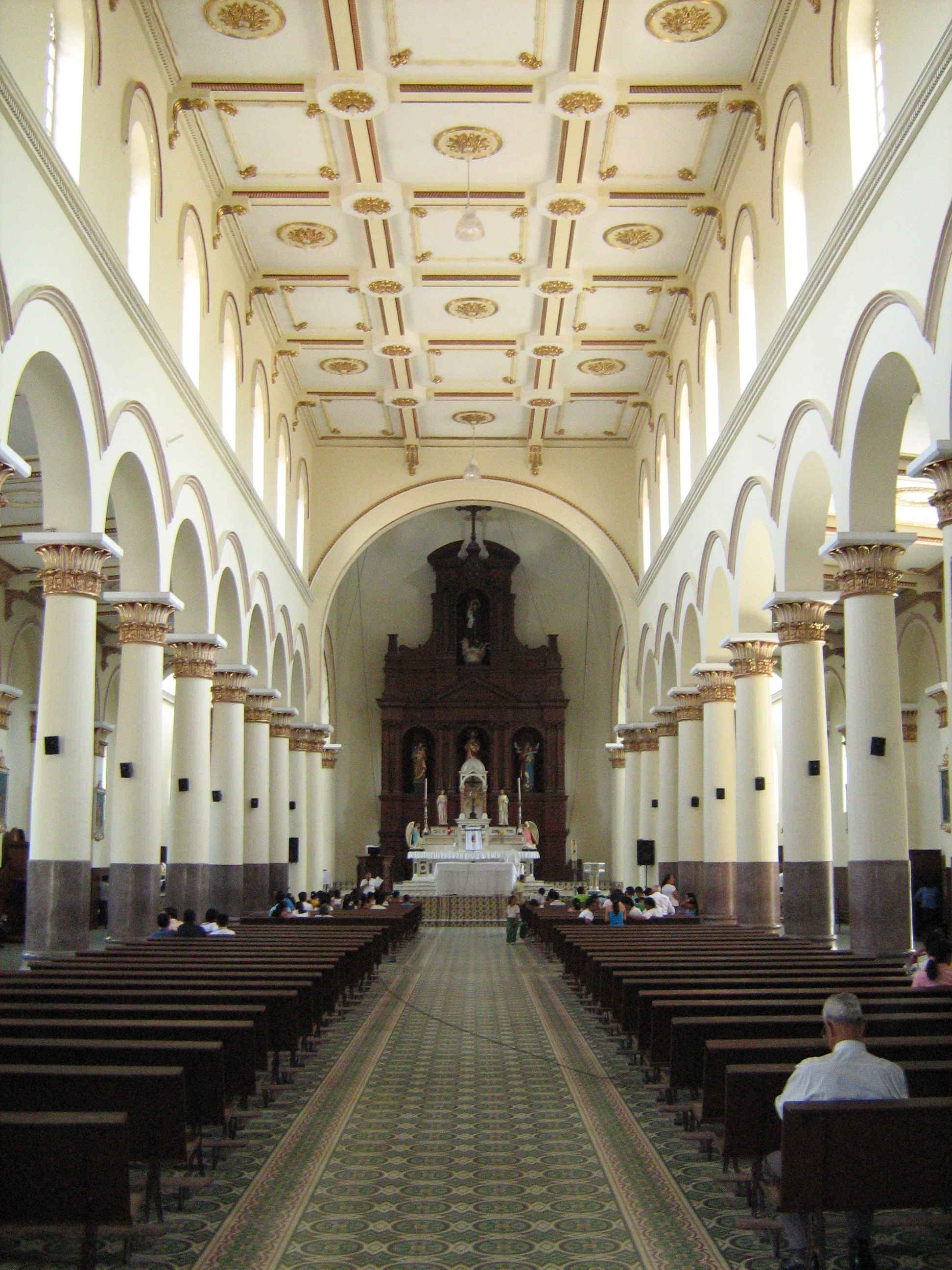 Iglesia de San Antonio de Padua en el municipio de Barbosa, Antioquia, Colombia.